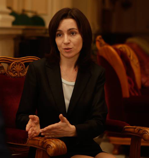 Maia Sandu: „Am avut o întrevedere cu domnul deputat Ovidiu Raețchi, reprezentant al Diasporei românești în Parlamentul României. Am discutat despre situația politică din Moldova, dar și despre condițiile grele în care trăiesc cetățenii moldoveni într-o țară sufocată de corupție. Opiniile mele și ale domnului Raețchi sunt comune în ce privește reforma clasei politice și nevoia de implicare a omenilor tineri în politica din Republica Moldova.”